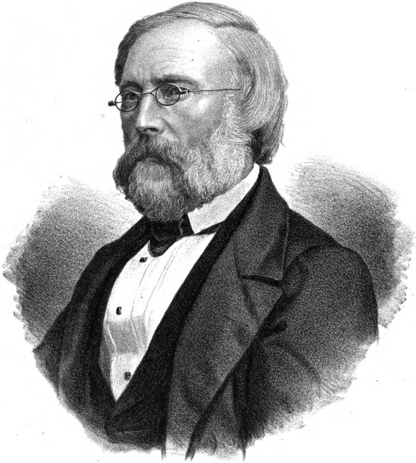 Den svenske målaren Gustaf Wilhelm Palm.